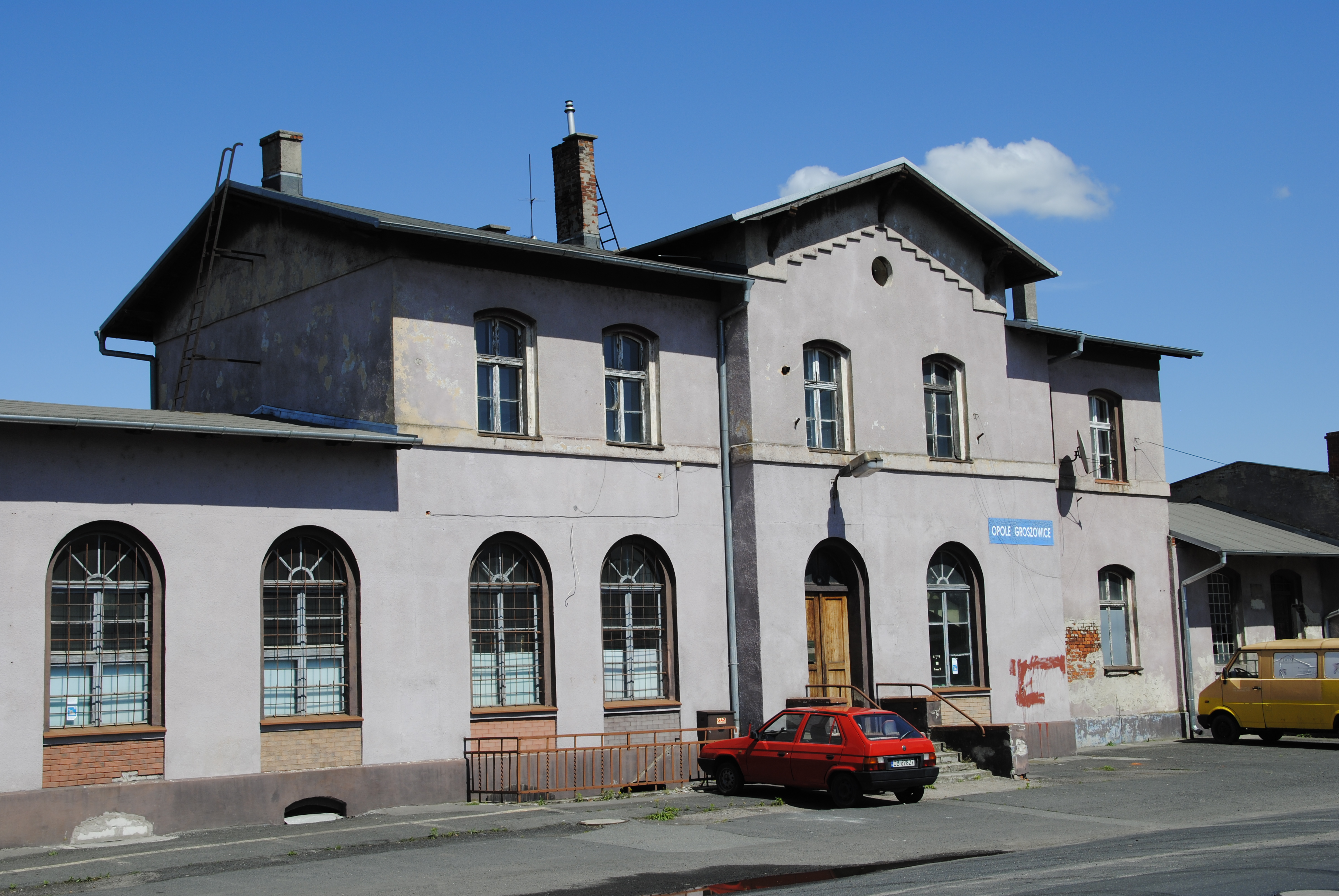 Bahnhof Oppeln-Groschowitz